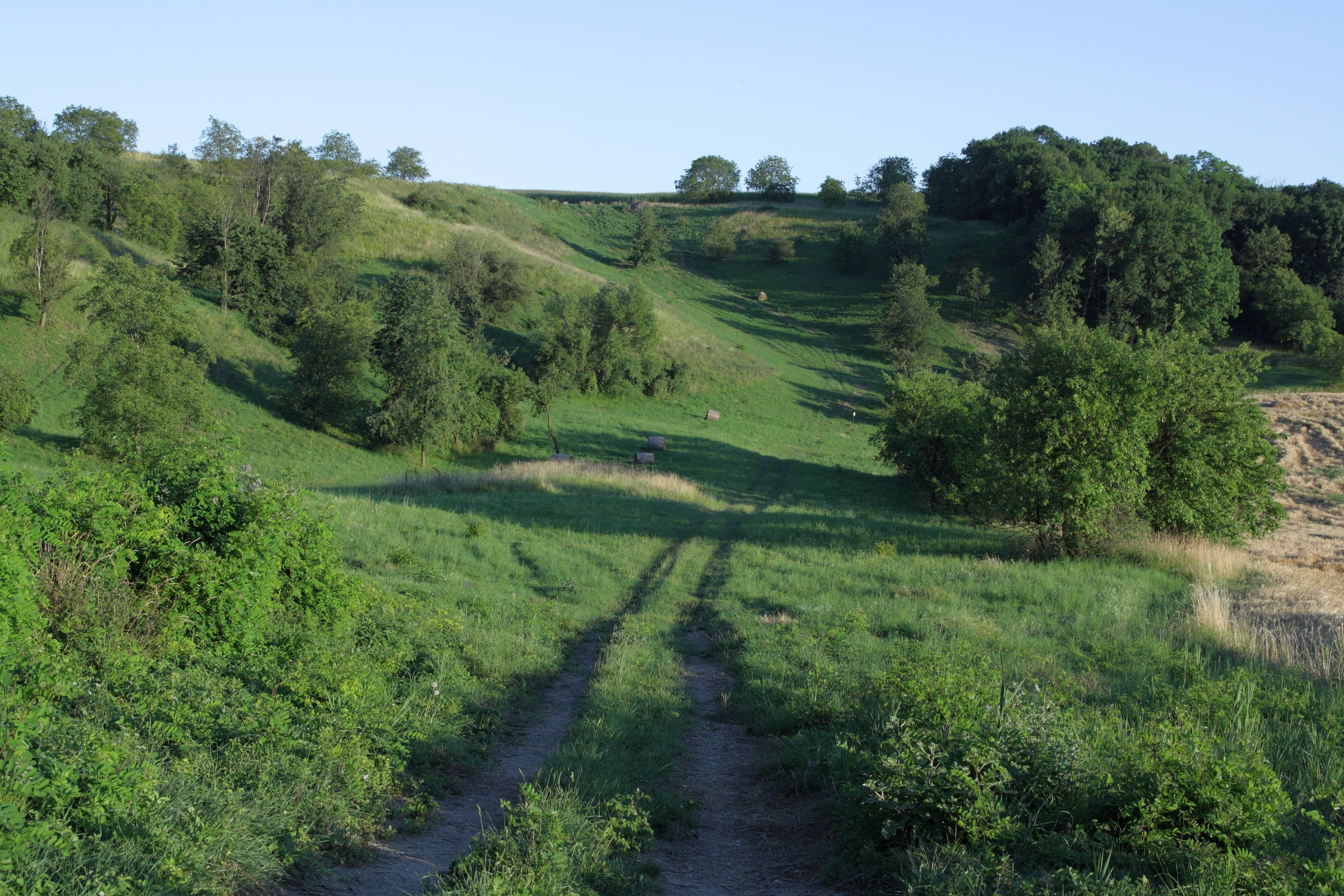 Přírodní rezervace Visengrunty